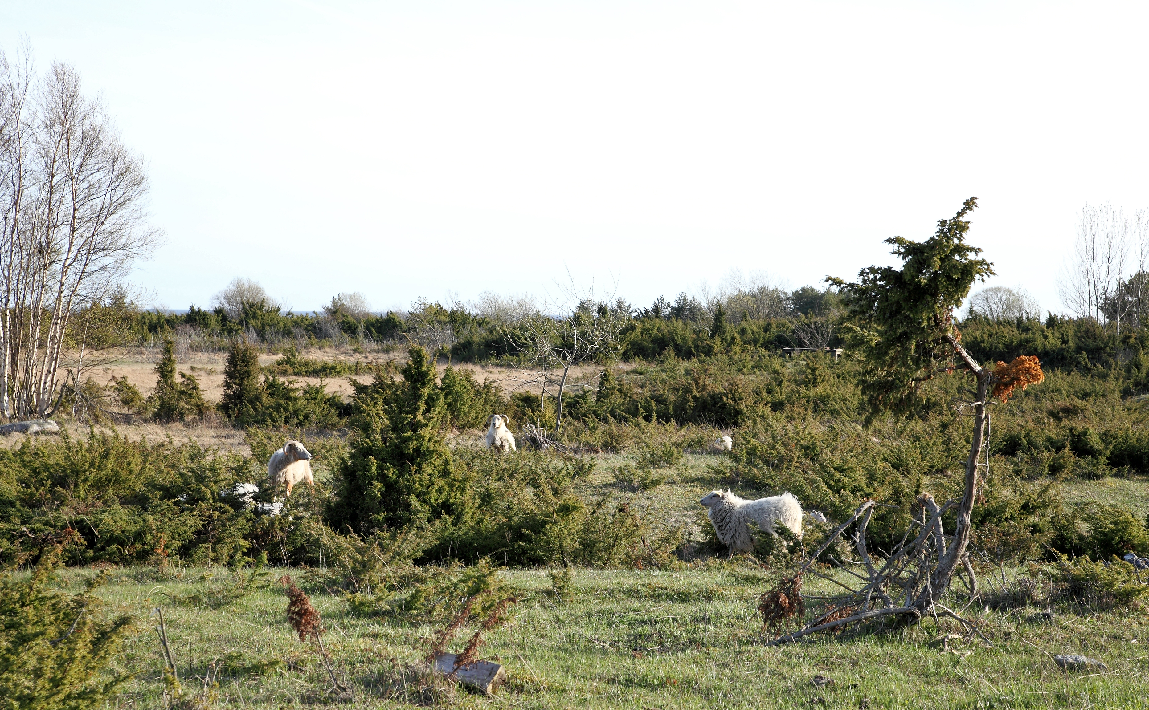 Lambad Osmussaarel.